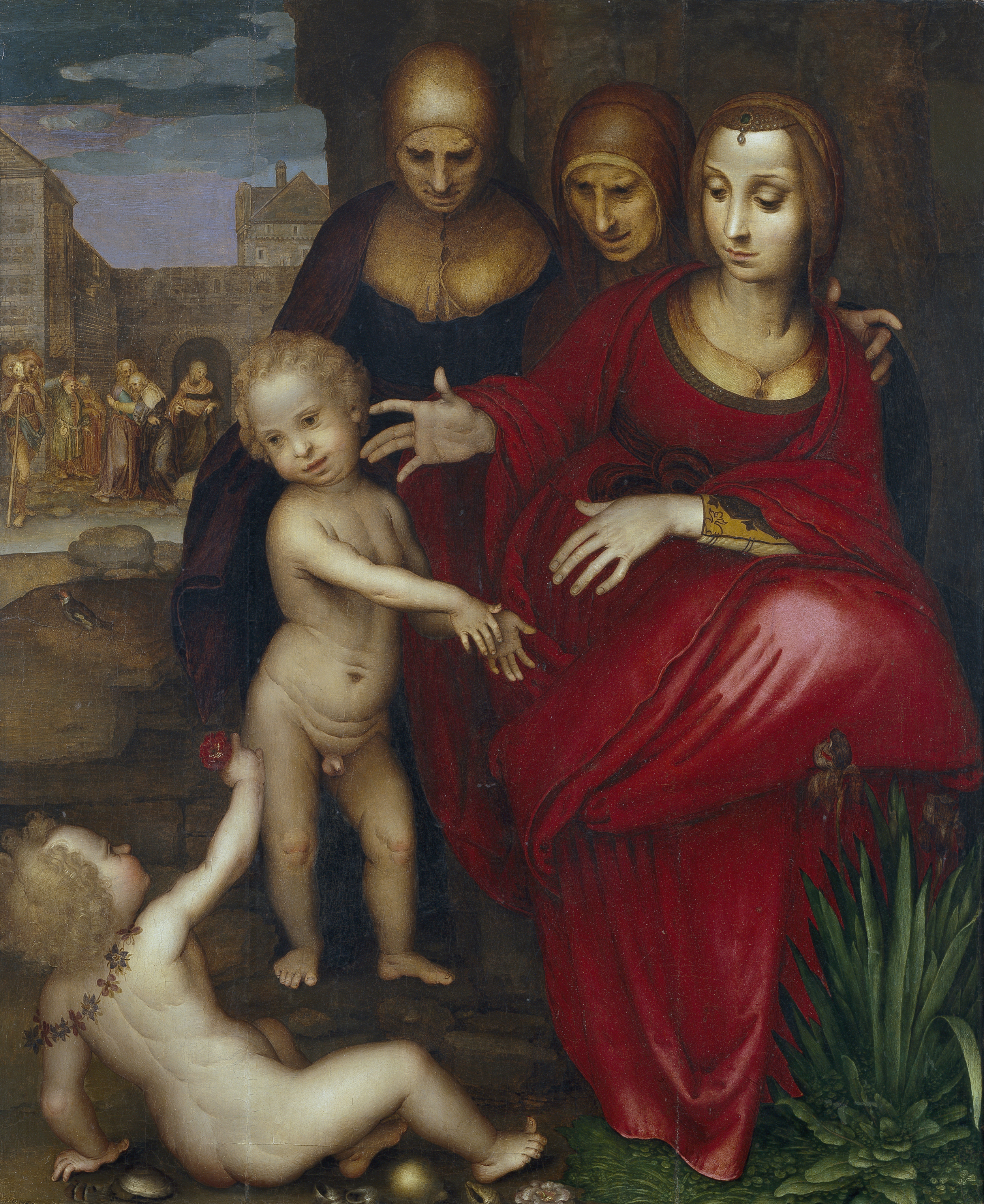 La obra representa a la Virgen María junto al Niño Jesús y acompañada por su madre, Santa Ana, por su prima Santa Isabel, y por el hijo de esta última, el futuro profeta San Juan Bautista.